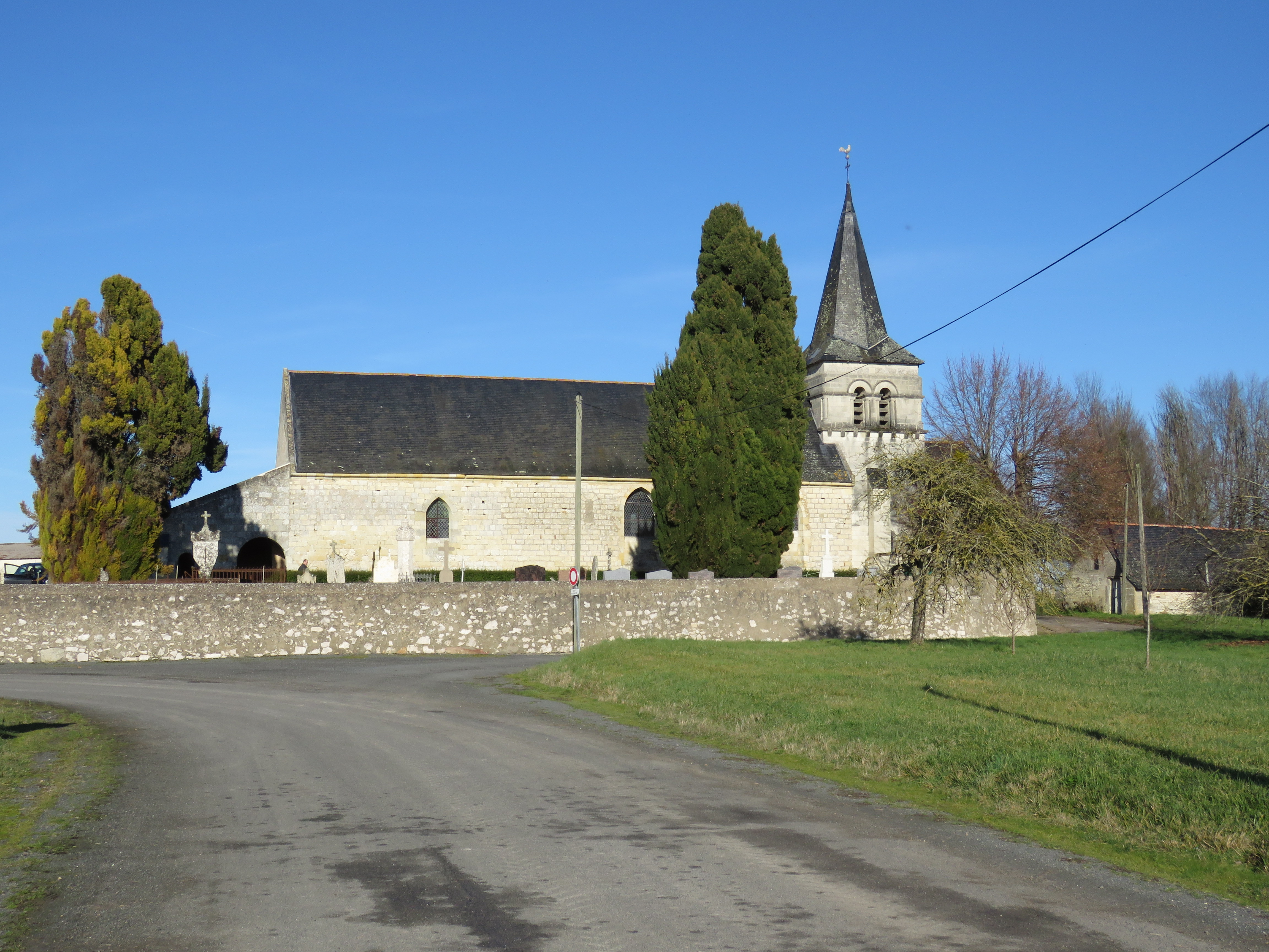 Église vue depuis le Sud.